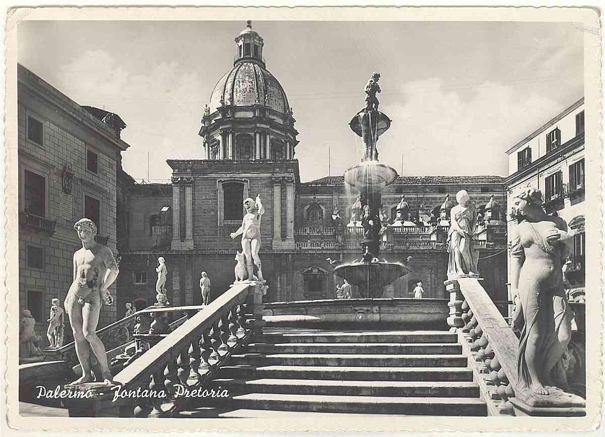 PA Palermo fontana Petoria